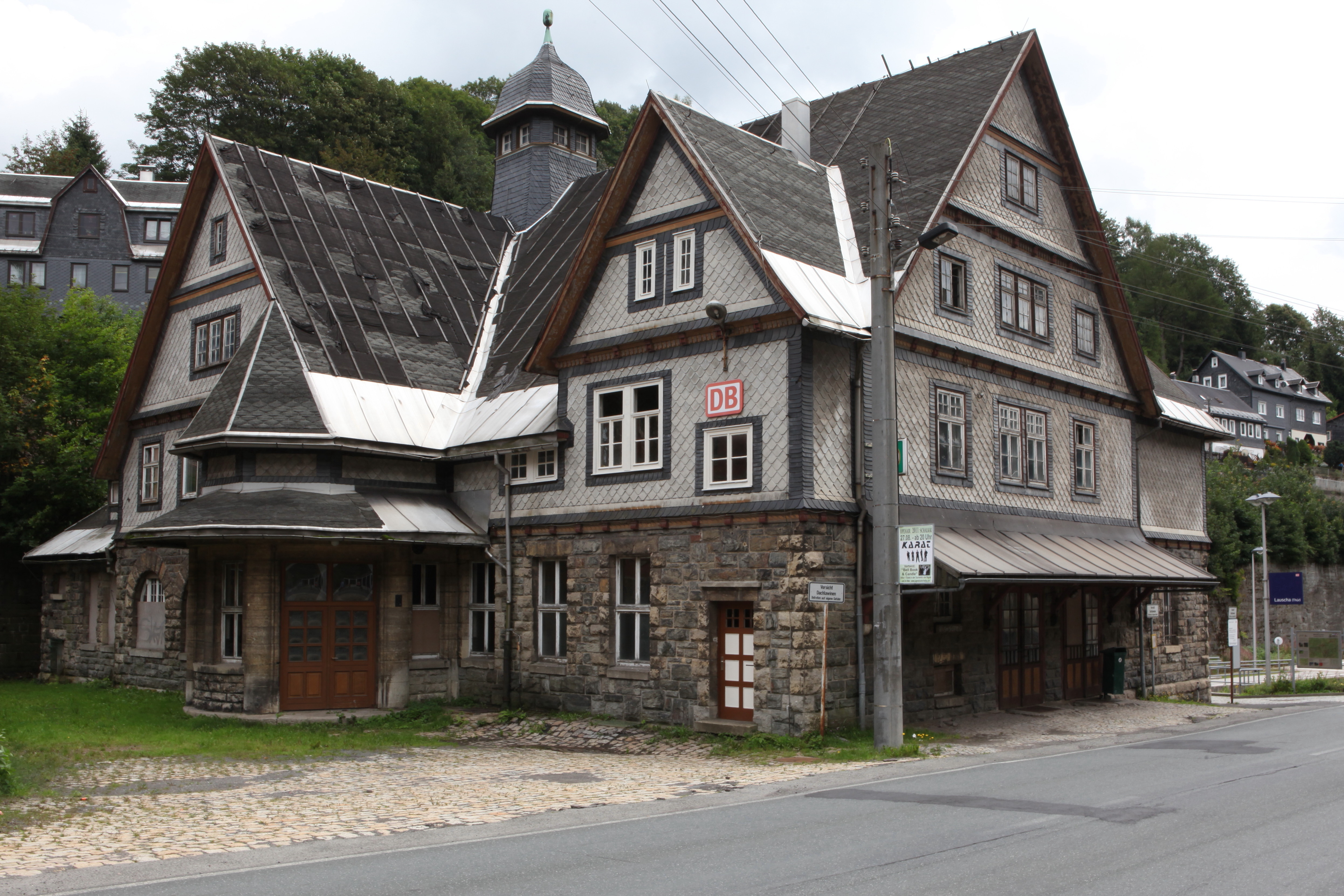 Bahnhof-Emfangsgebäude, 1911-14, Ing. Steinbrinck, Lauscha, Bahnhofstraße 31